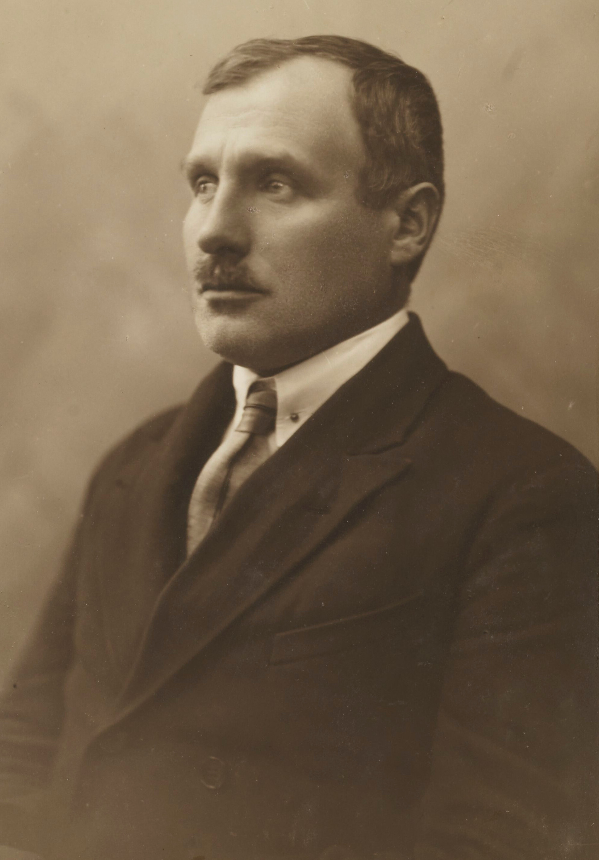 Norbert Barlicki, ok. 1916 r.